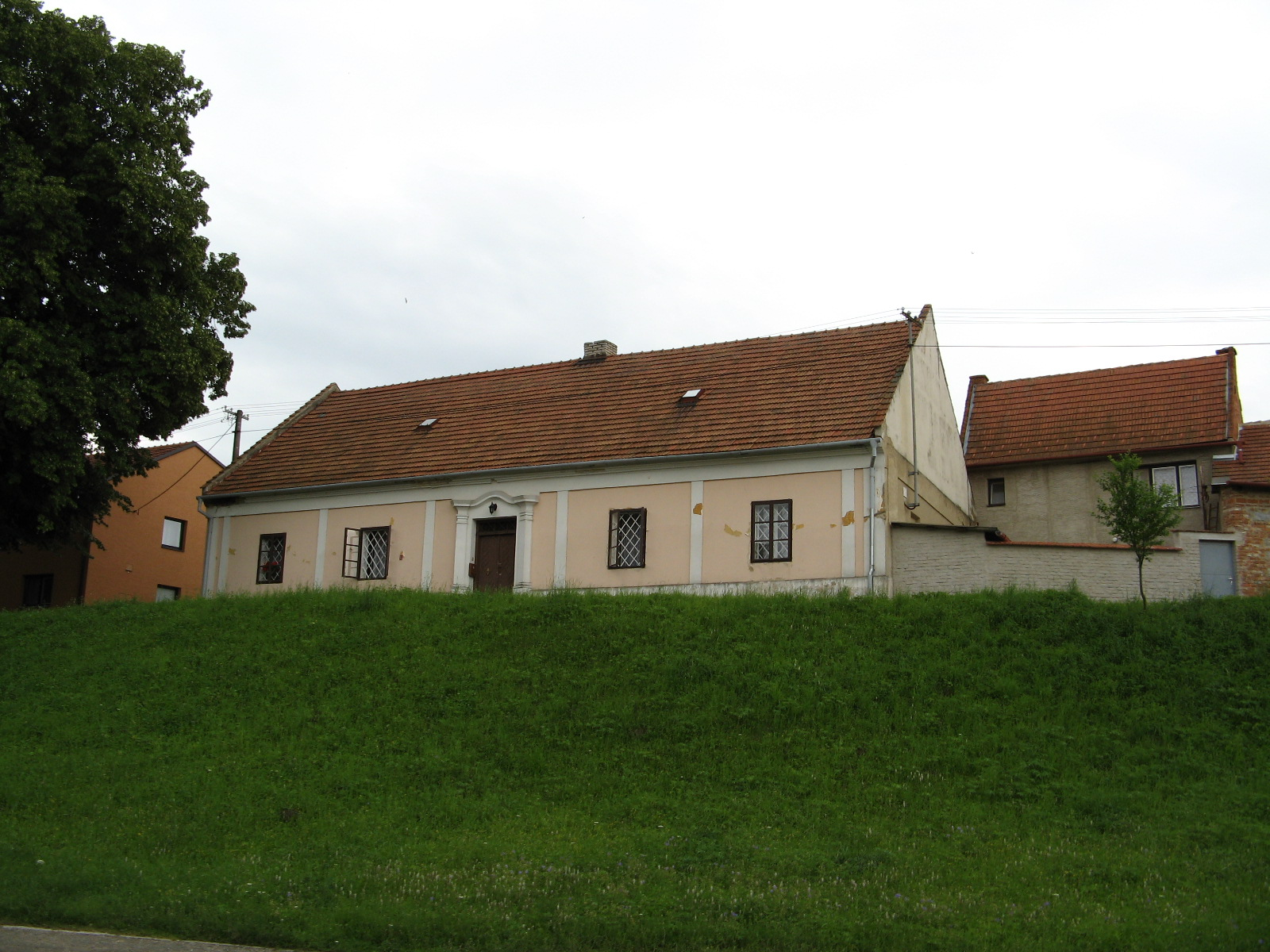 Fara (Pivín), náves 96, Pivín